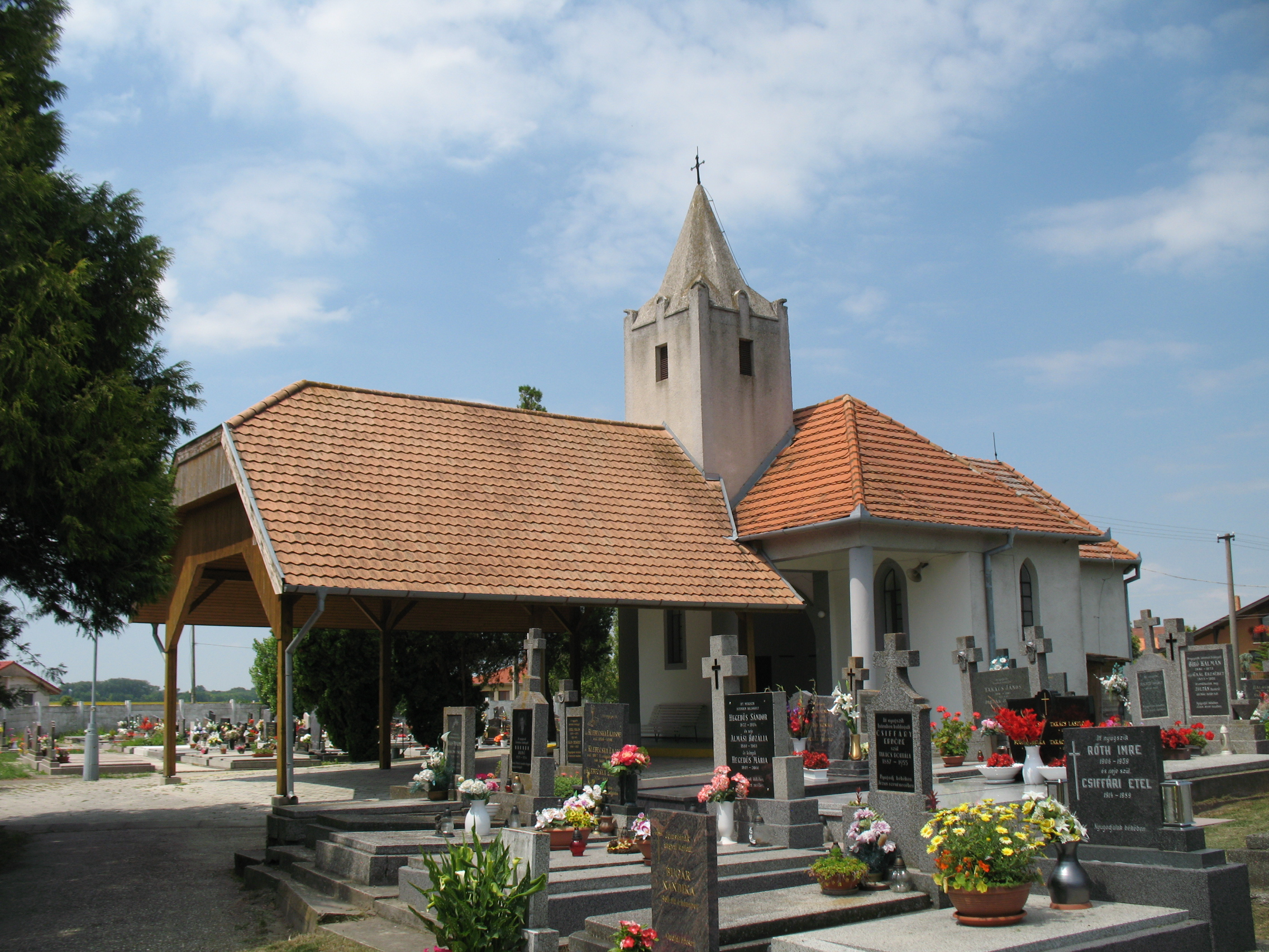 Csallóközkürt